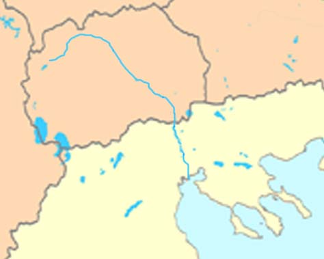 Ποταμός Αξιός Άδεια χρήσης Το παραπάνω αρχείο διανέμεται υπό τις δύο παρακάτω άδειες χρήσης. Μπορείτε να επιλέξετε την άδεια της προτίμησής σας.